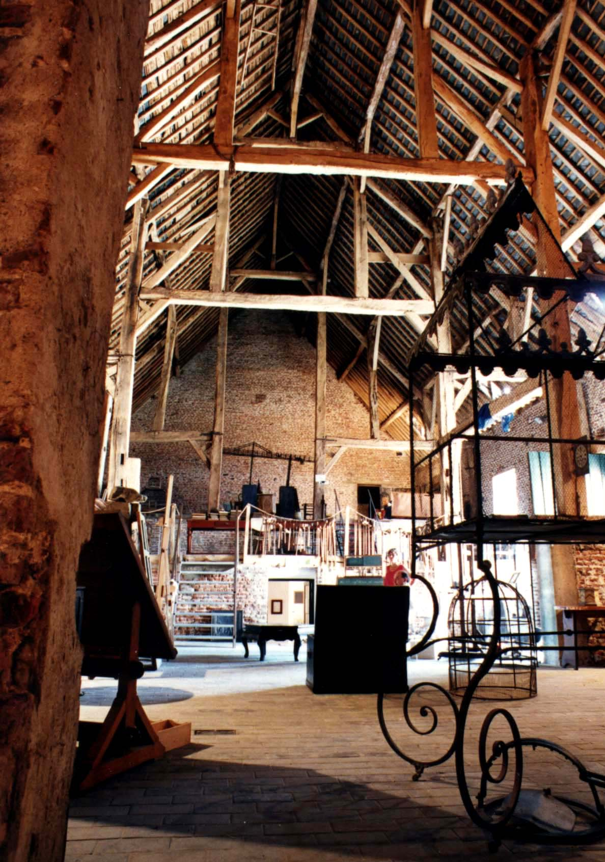 Grange de la Ferme castrale de Hermalle-sous-Huy, XVIIe siècle